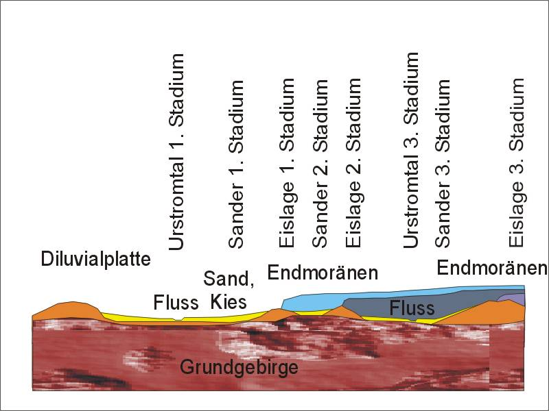 fiktiver Schnitt durch ein Urstromtal